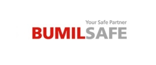 BumilCi_2